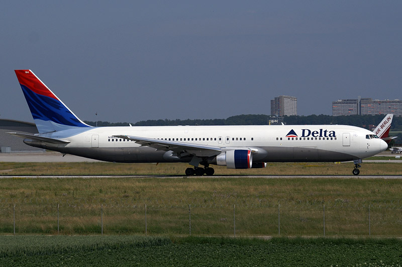 Delta Air Lines Boeing 767-332(ER) N194DN